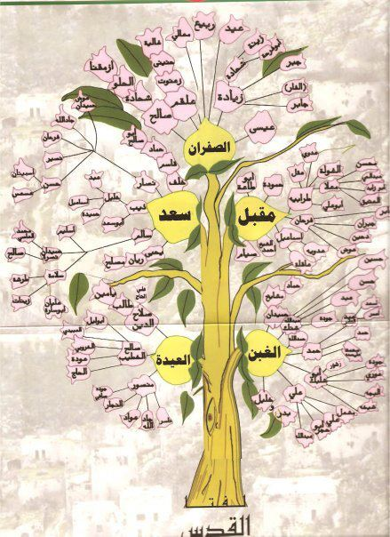 شجرة حمايل وعائلات لفتا